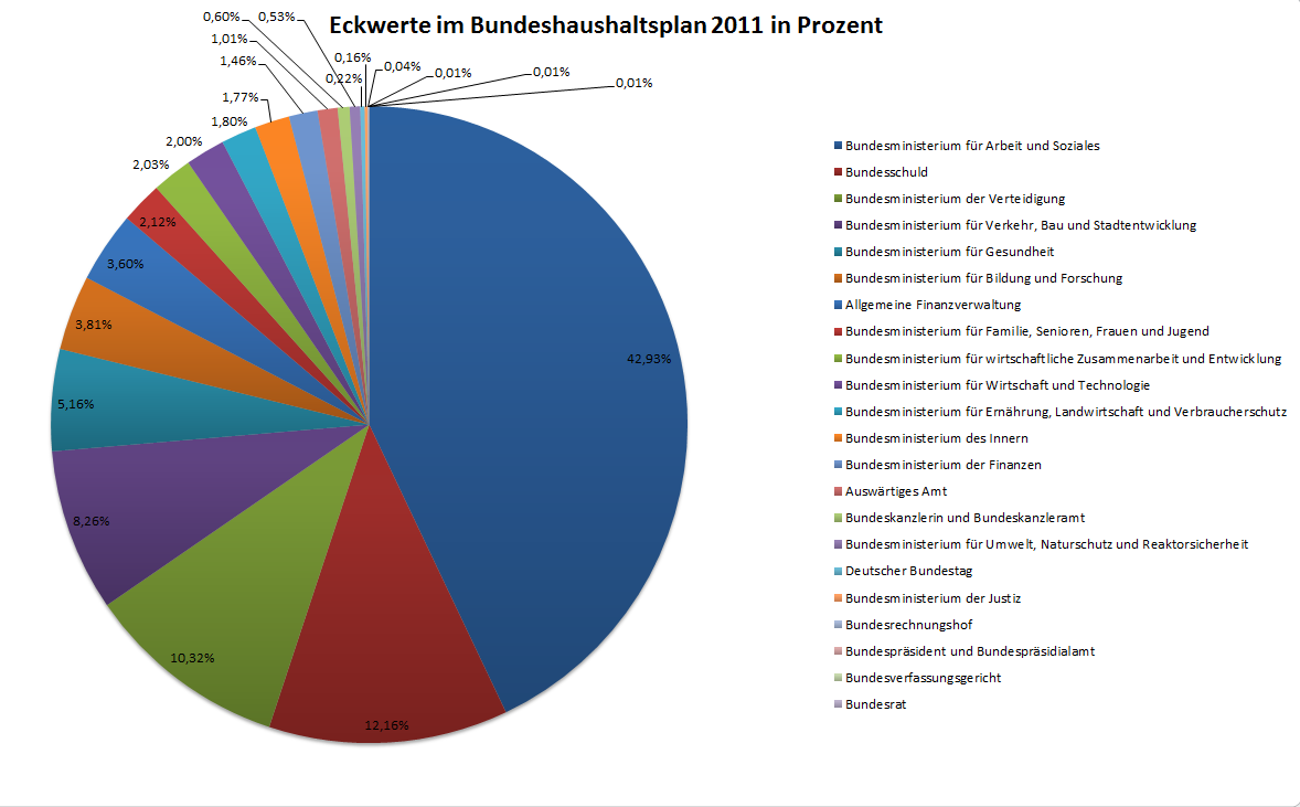 Basiert auf der Tabelle "Eckwerte im Bundeshaushaltplan" aus dem WP-Artikel "Bundeshaushaltsplan (Deutschland)" Stand 24.01.2013 22:01h